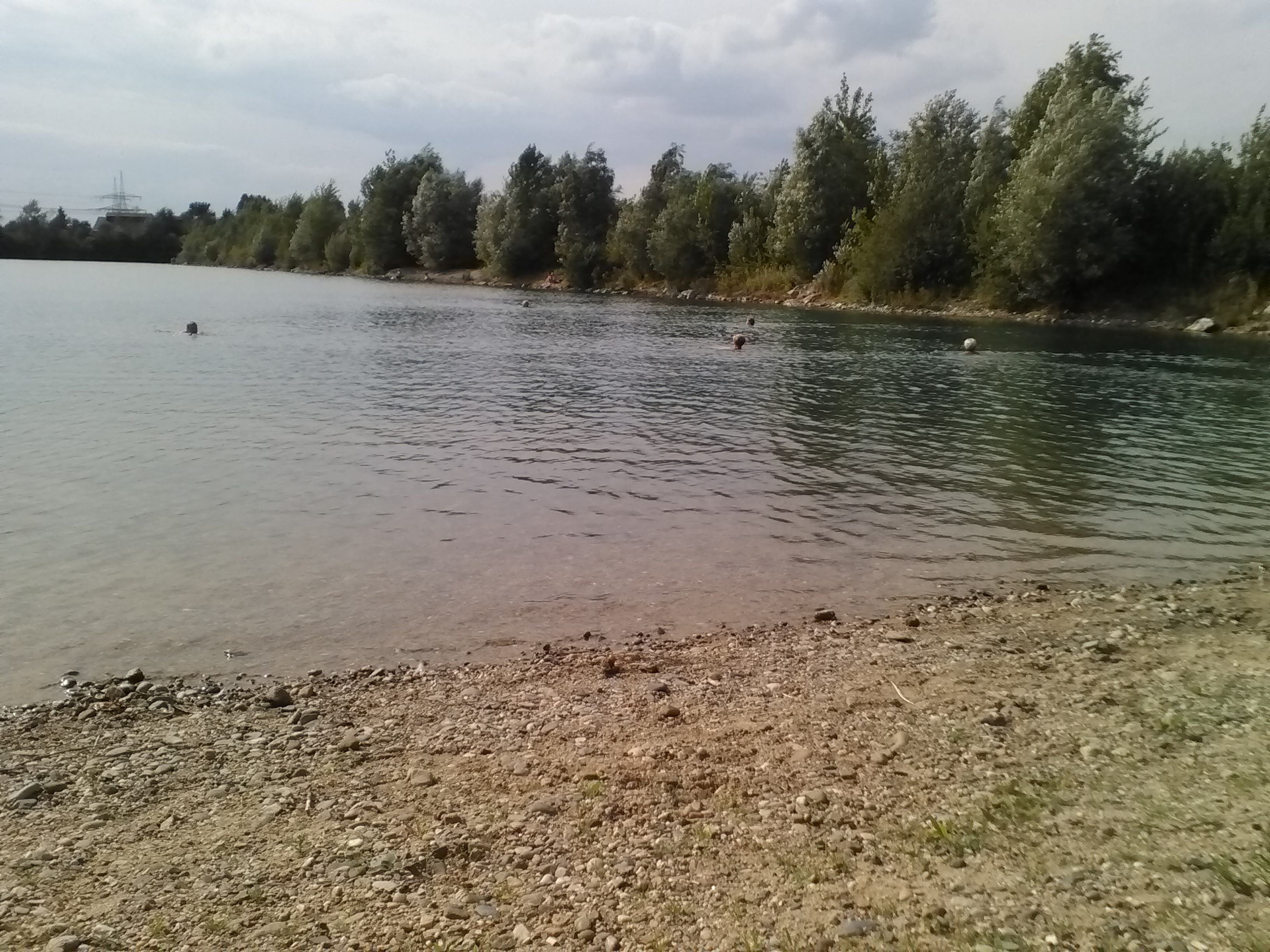 Die Kiesgrube in vor dem Verfüllen im Jahr 2018